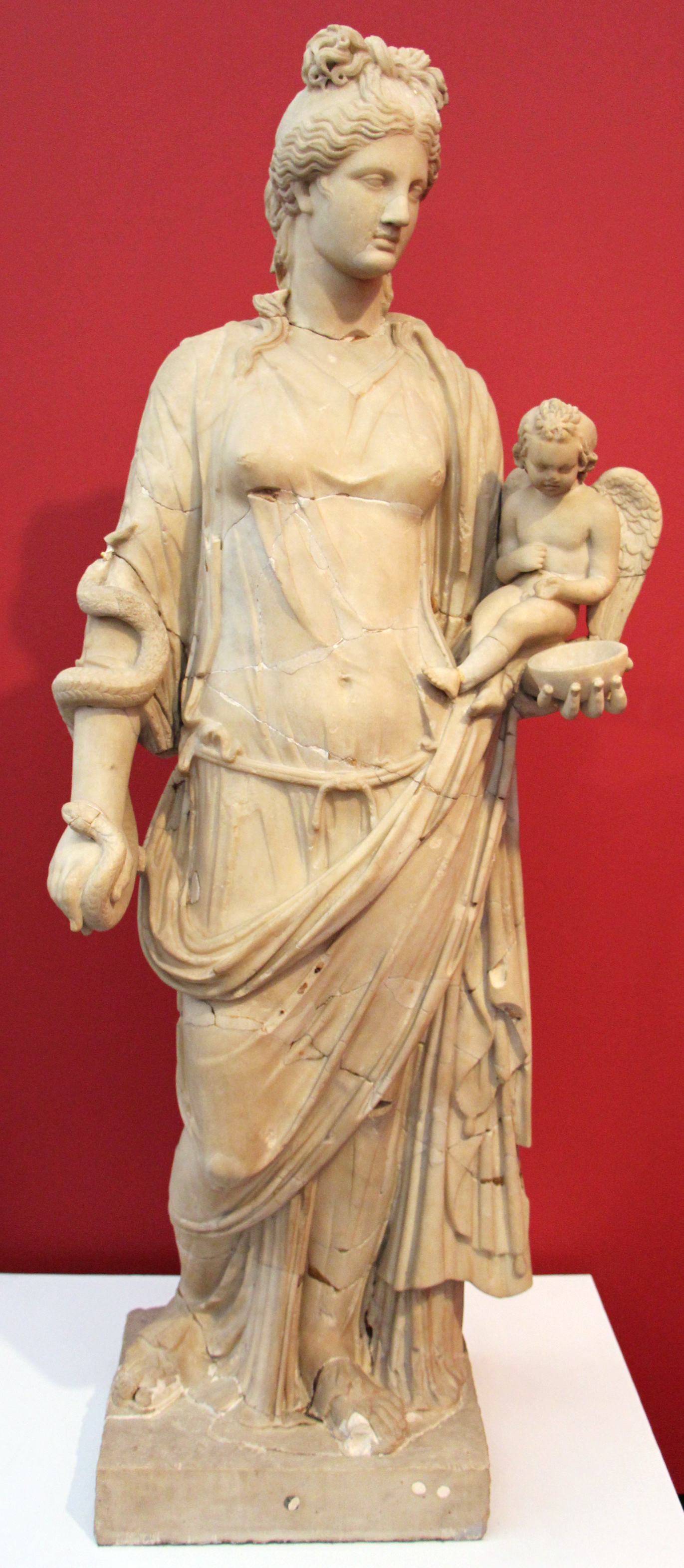 Museu de Arte de São Paulo